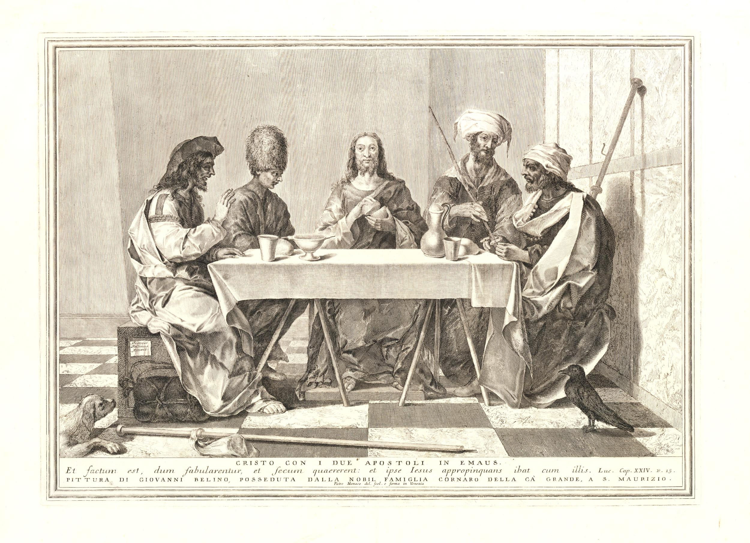 "La Cena en Emaús" (o "Cristo con los 2 apóstoles en Emaús"). Grabado de Pietro Monaco representado una obra de Giovanni Bellini destruida en un incendio en Viena en el siglo XVIII